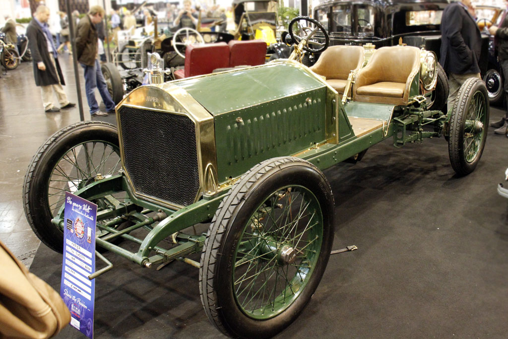 1909 Napier T23 Roadster 2011 Techno Classica Essen